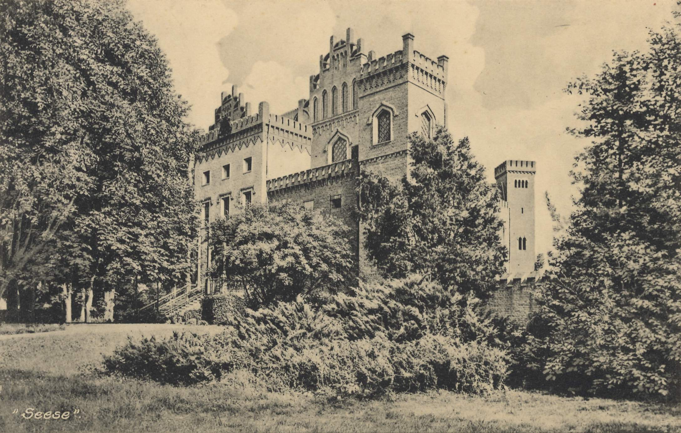 Postkarte Schloss Seese, Calau, Brandenburg